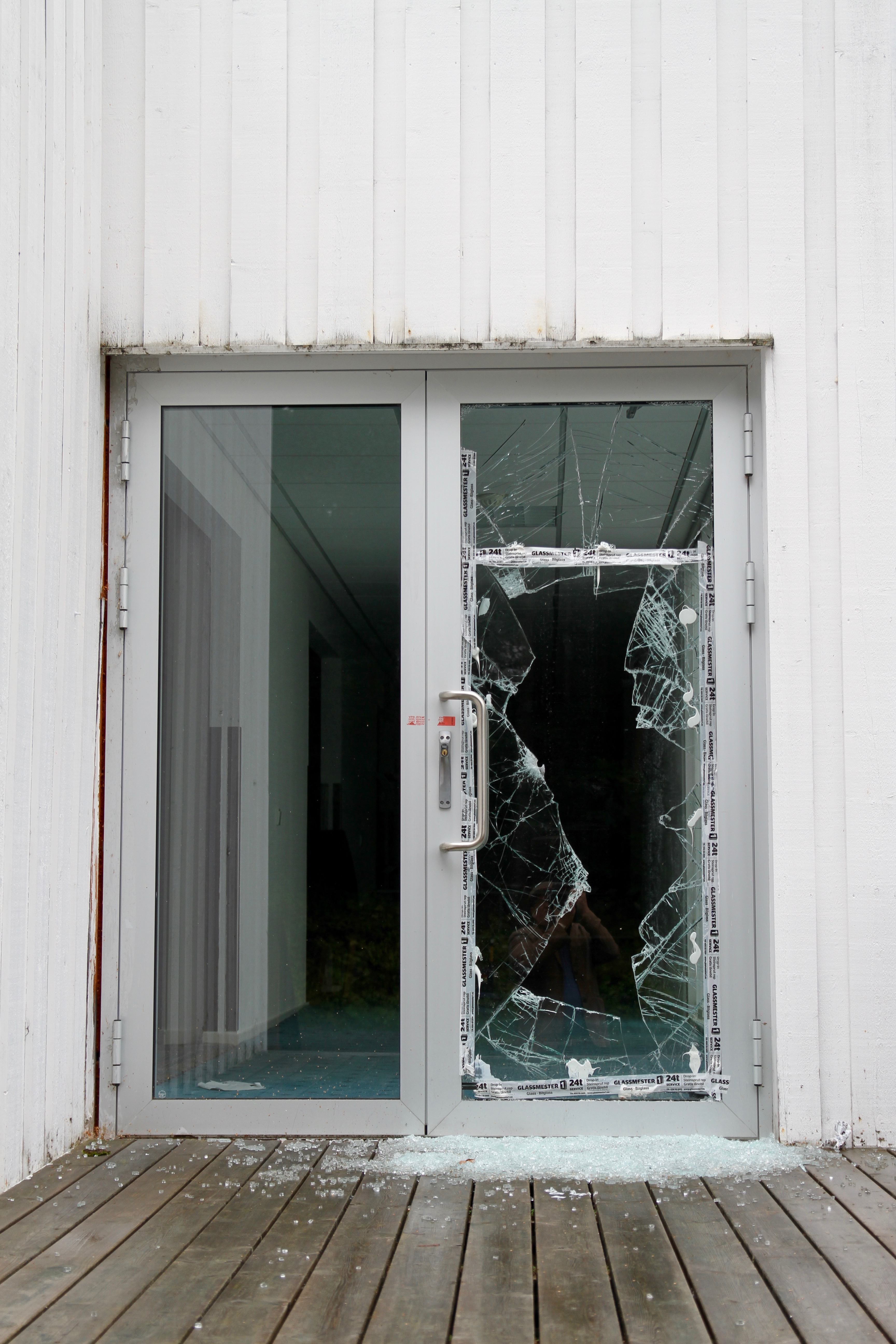 Al-Noor Islamic Centre i Bærum. Dette er døra Philip Manshaus skjøt seg igjennom for å komme inn i bygningen.